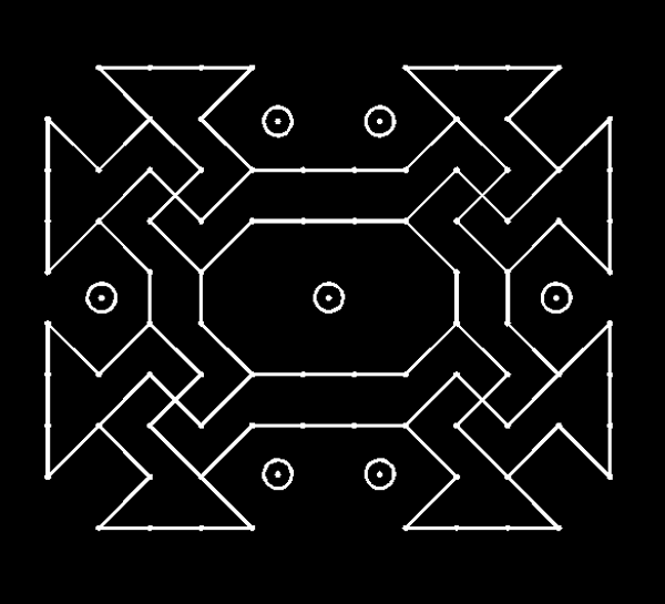 Drawn by mayooranathan